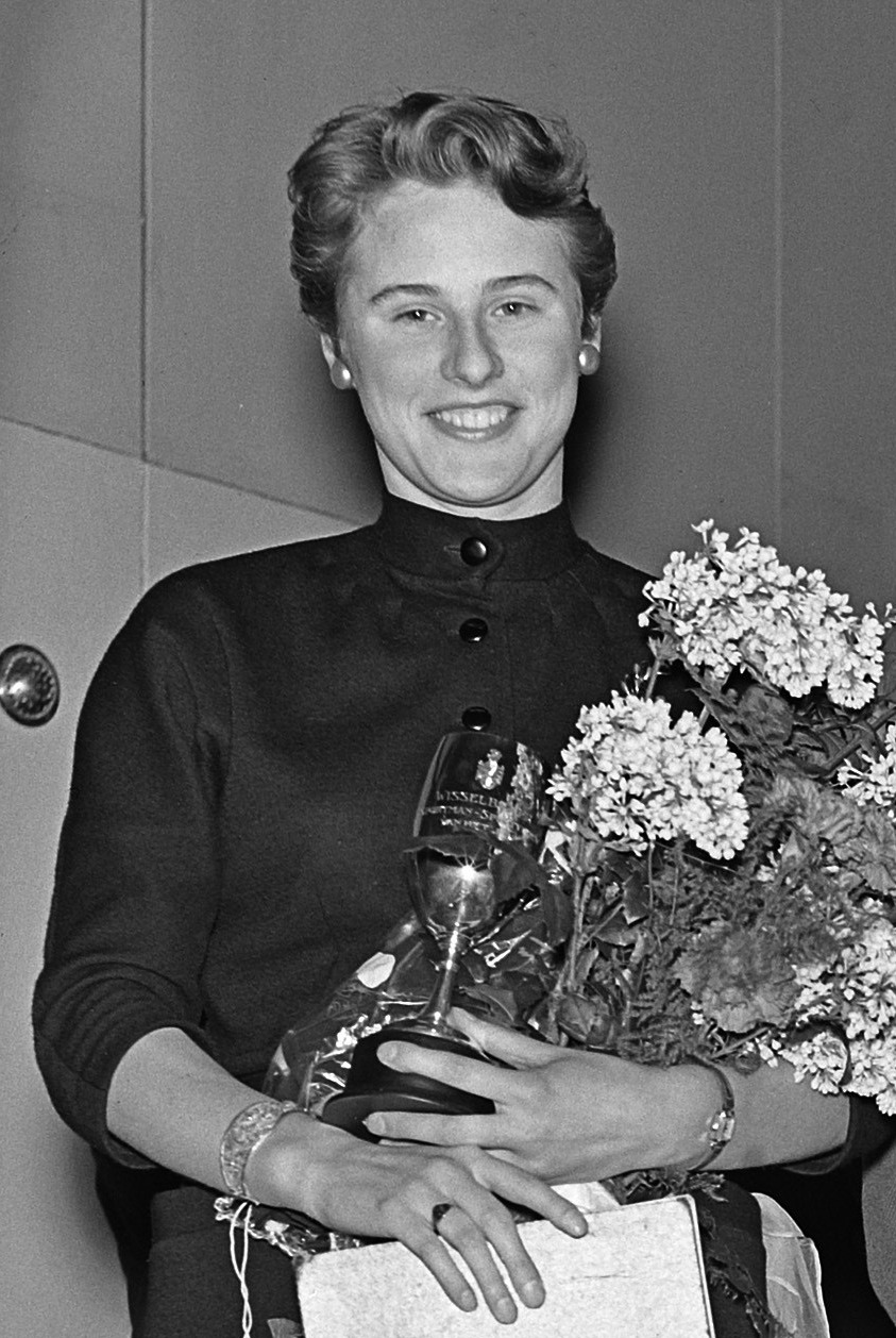 AVRO verkiezing beste sporter 1954, Geertje Wielema (1) en Wout Wagtmans (2)